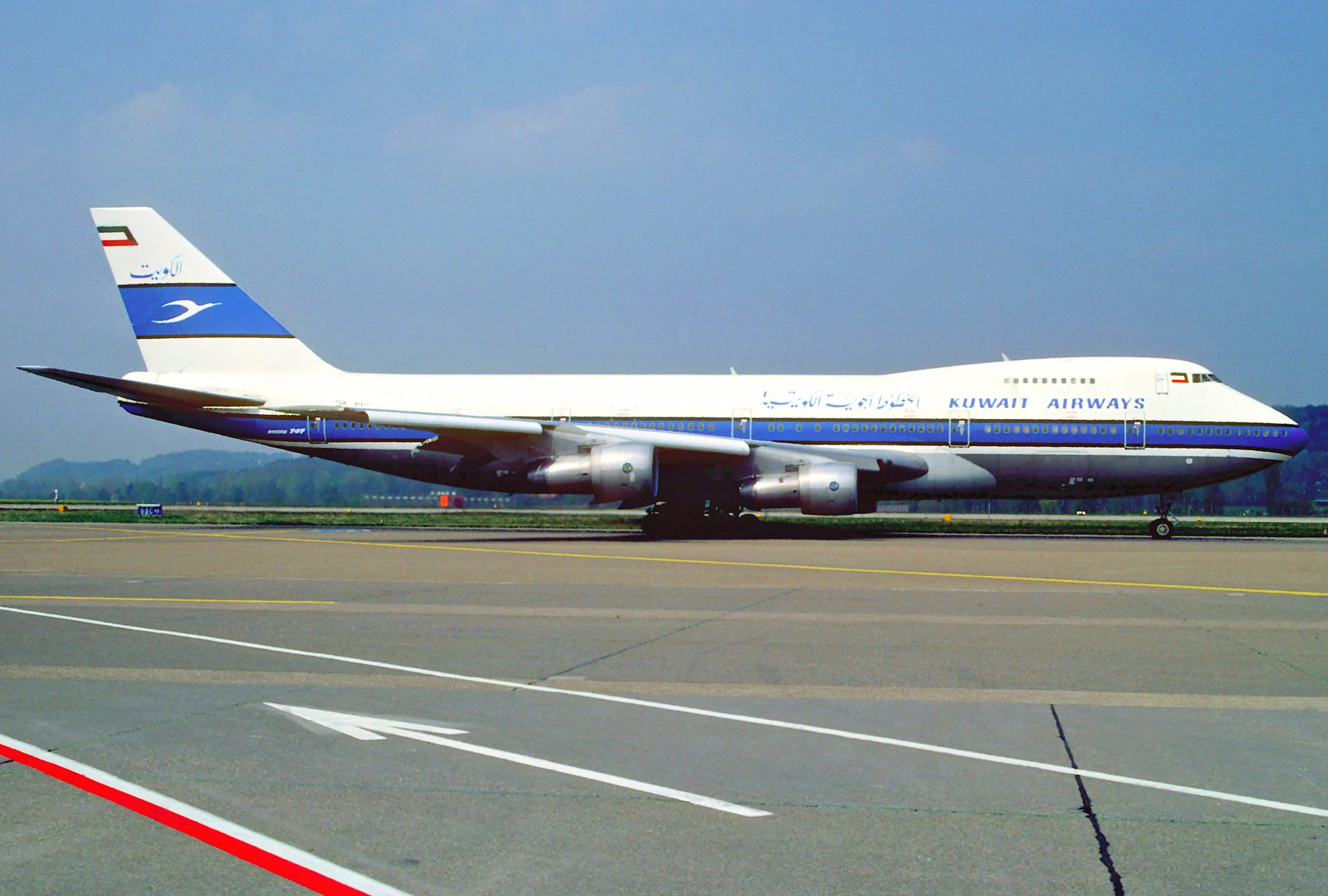 Kuwait Airways Boeing 747-269B (M); 9K-ADC, May 1988